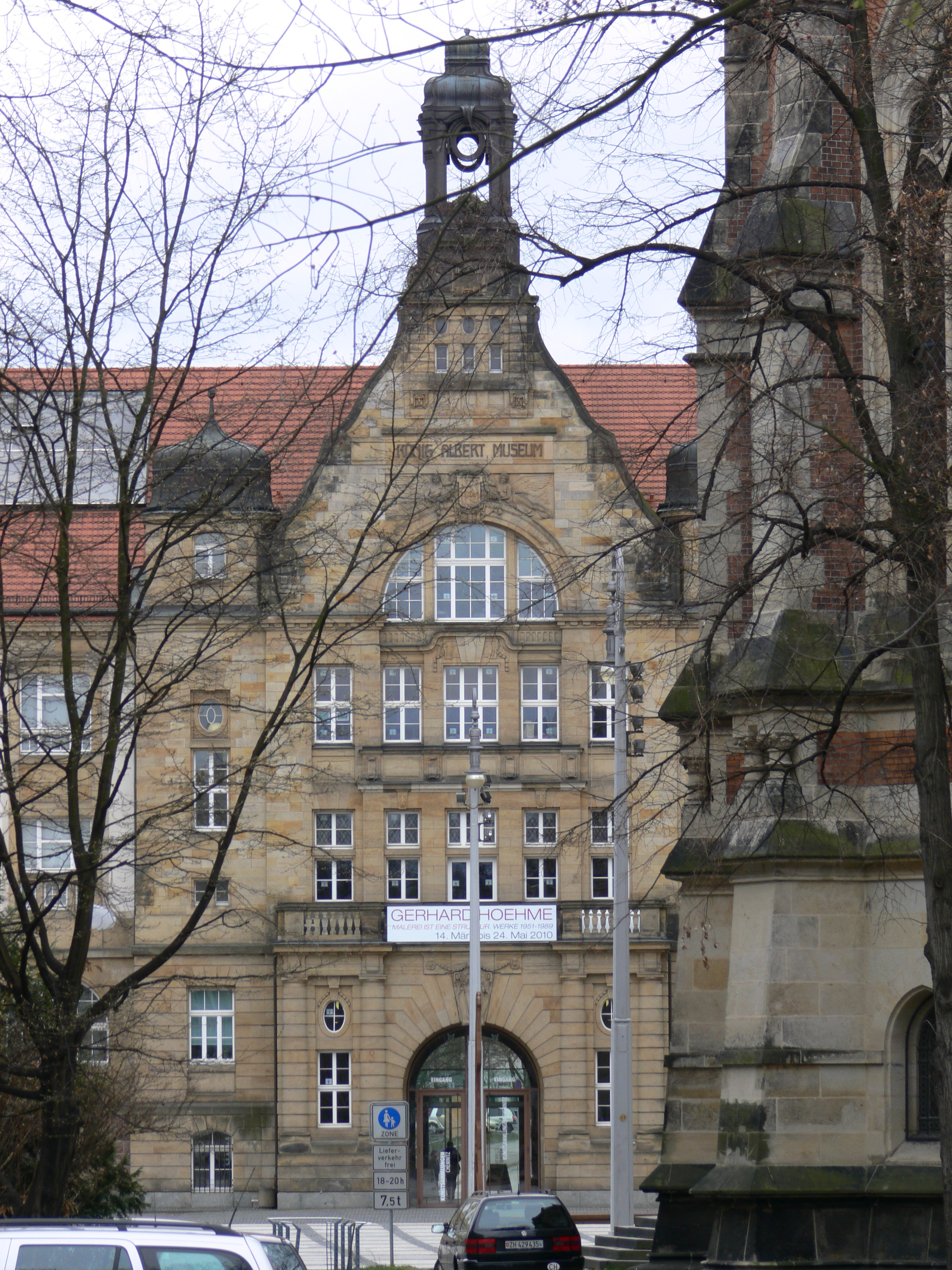 Chemnitz, König-Albert-Museum (Sitz der Städt. Kunstsammlungen) am Theaterplatz